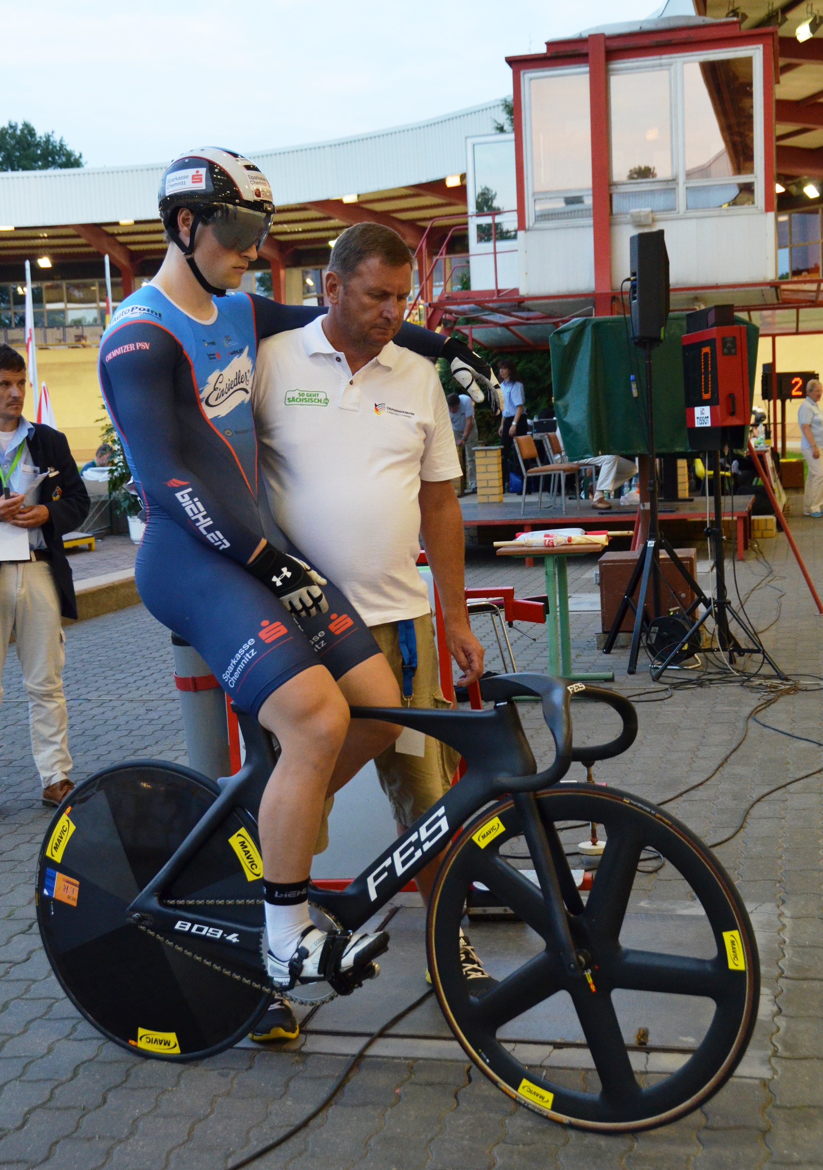 Stefan Bötticher, deutscher Radsportler The making of this document was supported by the Community-Budget of Wikimedia Germany.